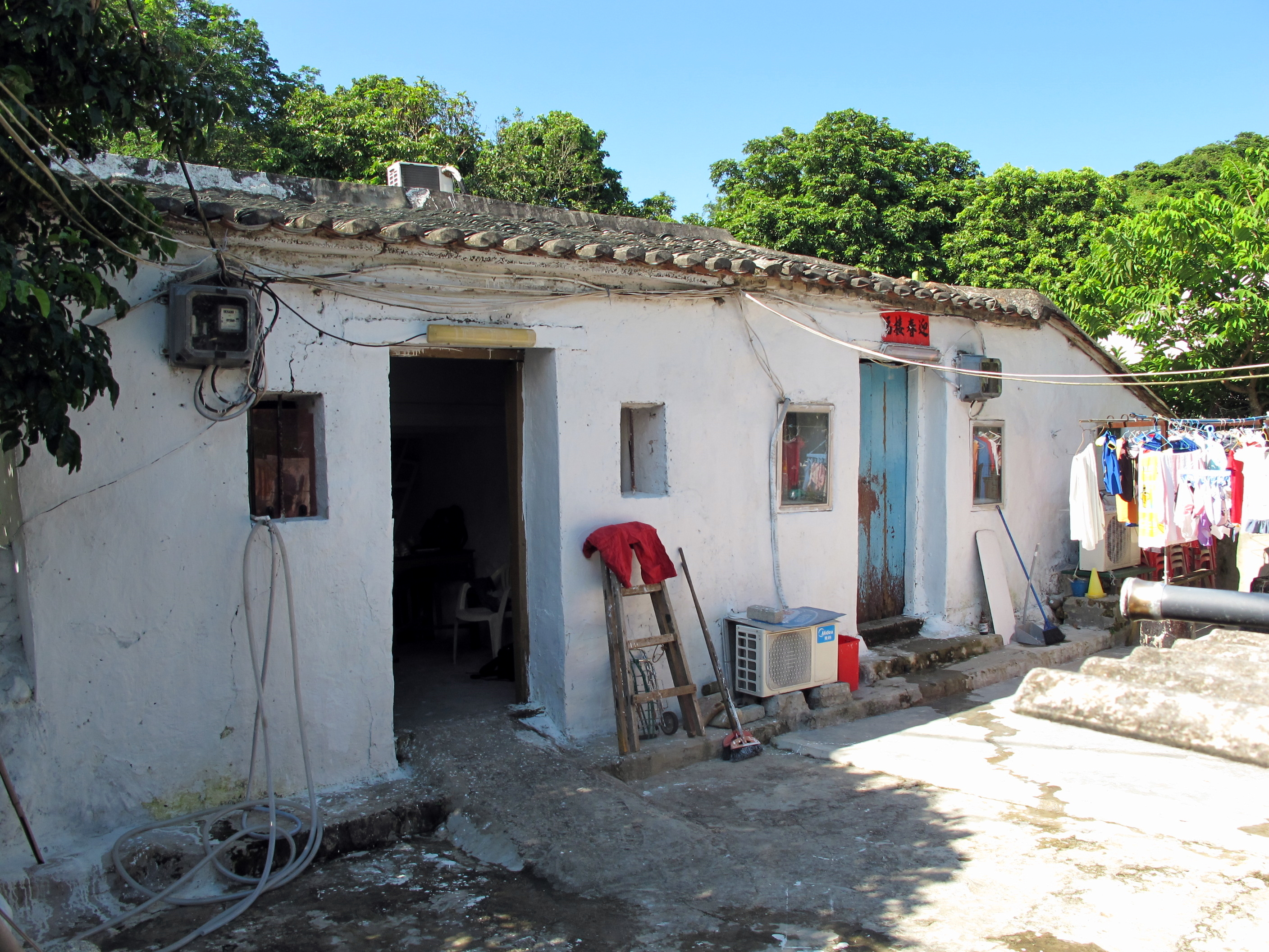 Ham Tin Village